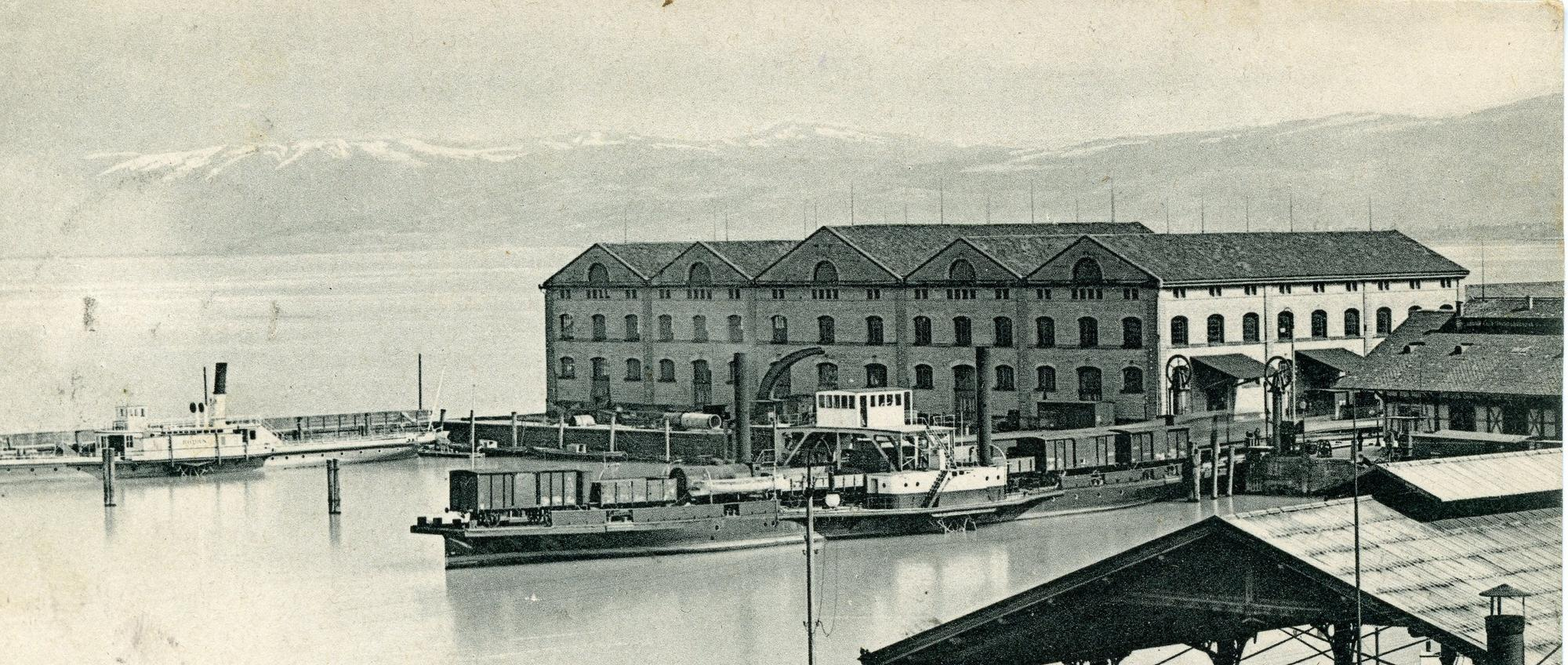 Hafen Romanshorn mit dem Dampfschiff Bodan und einer zweiten Dampftrajektfähre. Sie verkehrte auf der Trajektverbindung nach Lindau und zog bei Bedarf auch Trajektkähne.